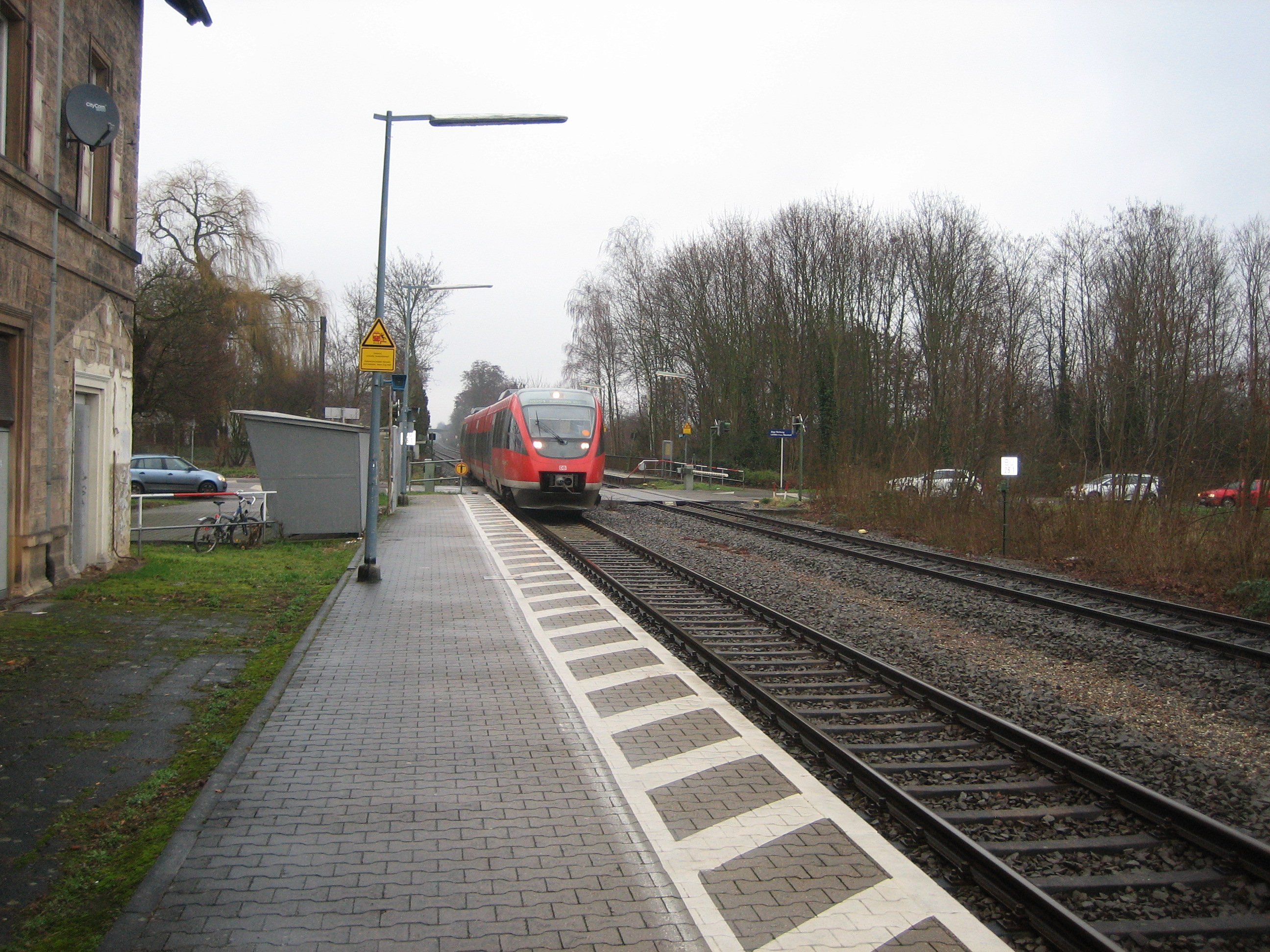 Zug bei der Einfahrt in Rohrbach (Pfalz)